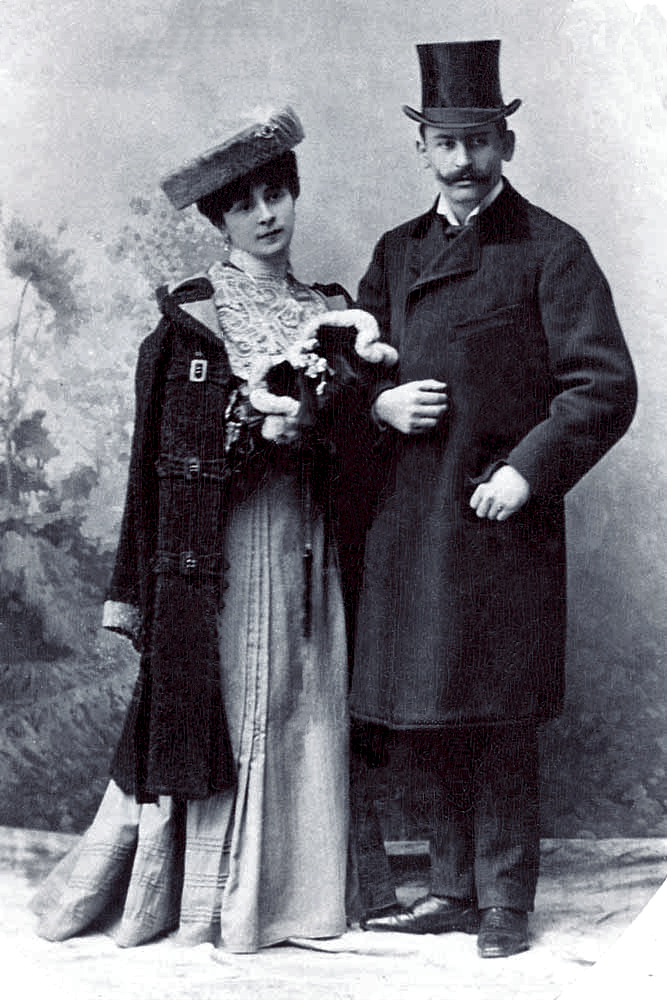 Nikolaus von Flondor und Helene von Grigorczea 1899 oder davor